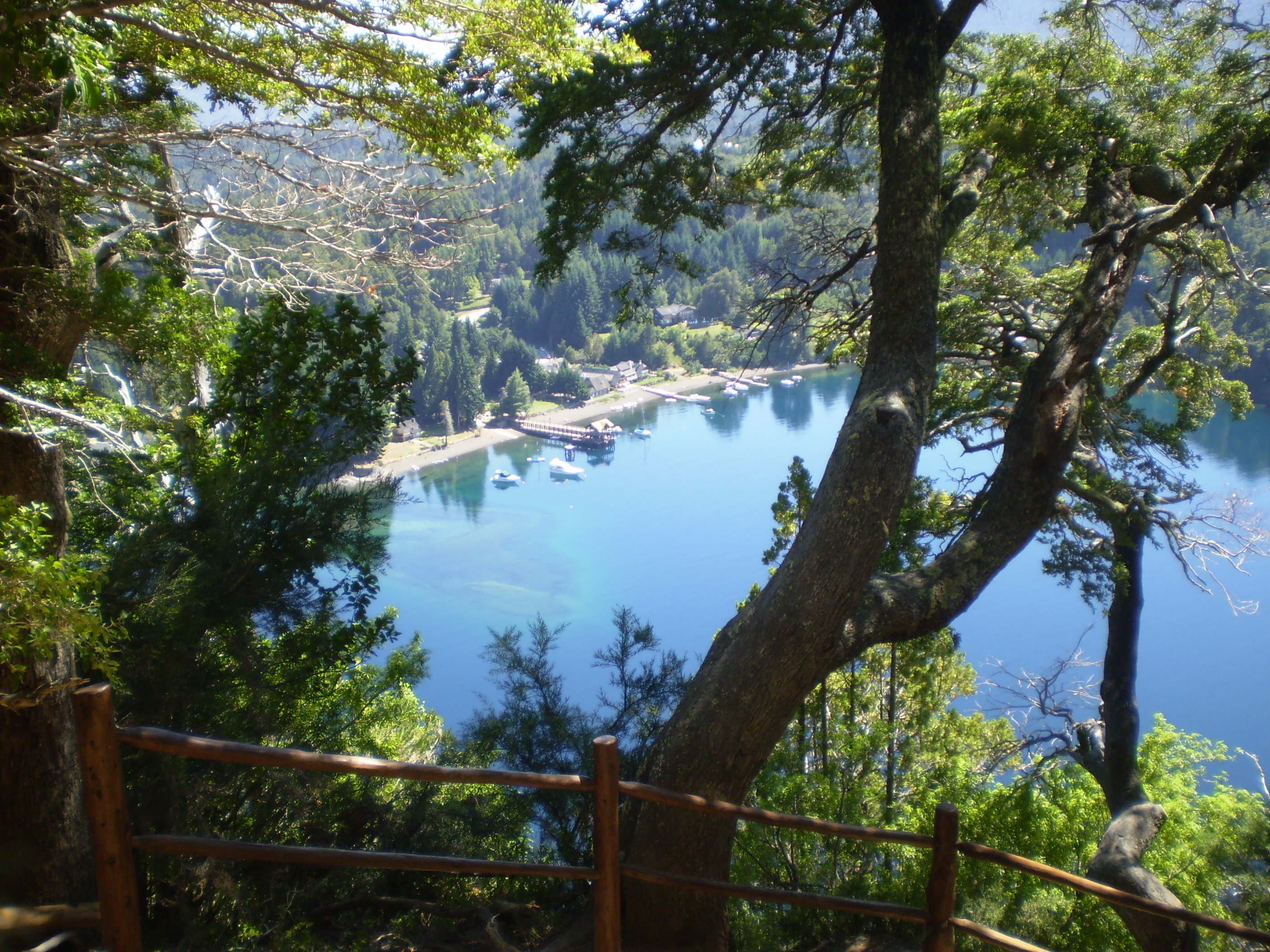 (vista del puerto desde el mirador oriental de la península de Quetrihué) Villa La Angostura, Neuquén, Argentina